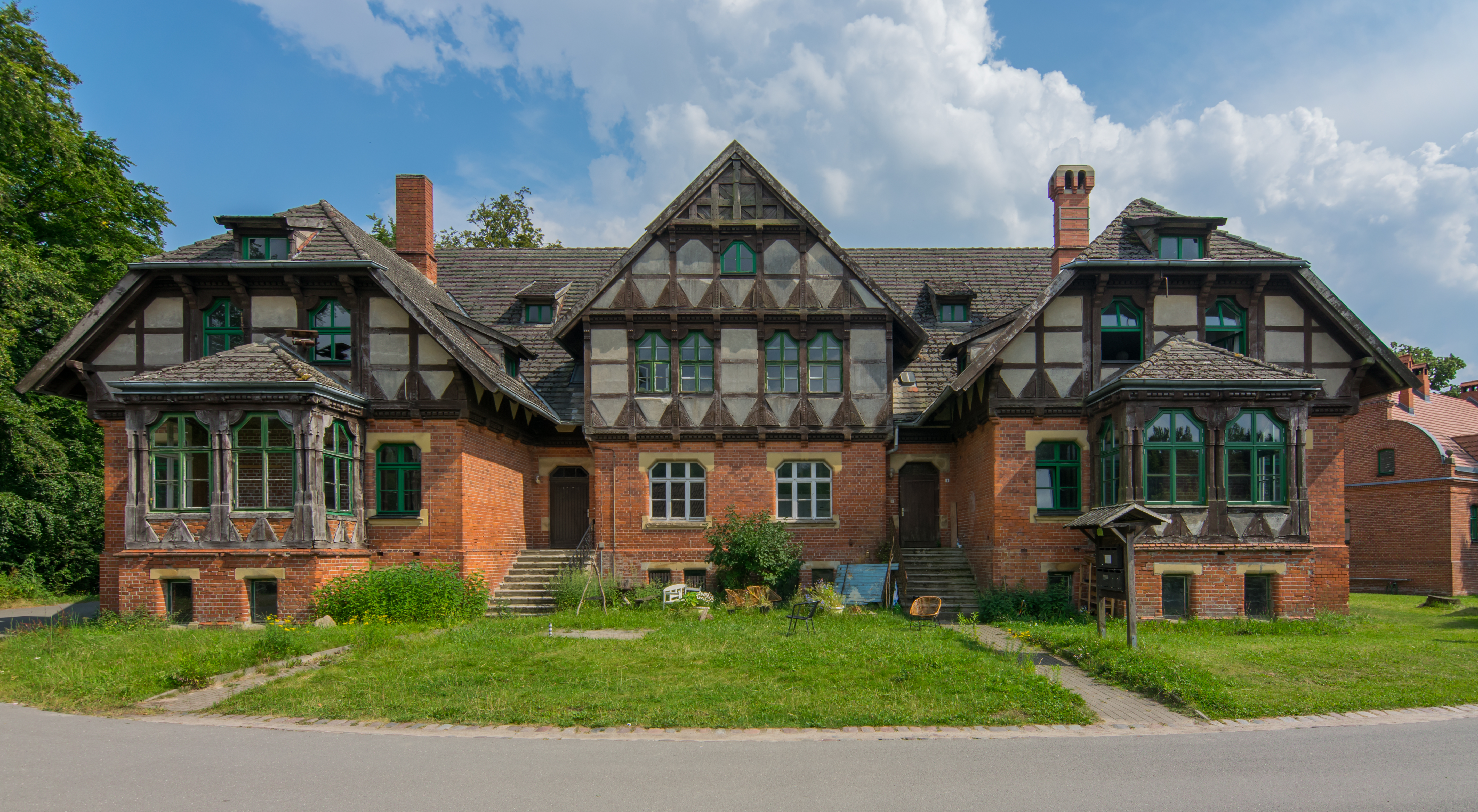 Waldhaus des Schlosses Wiligrad in Lübstorf